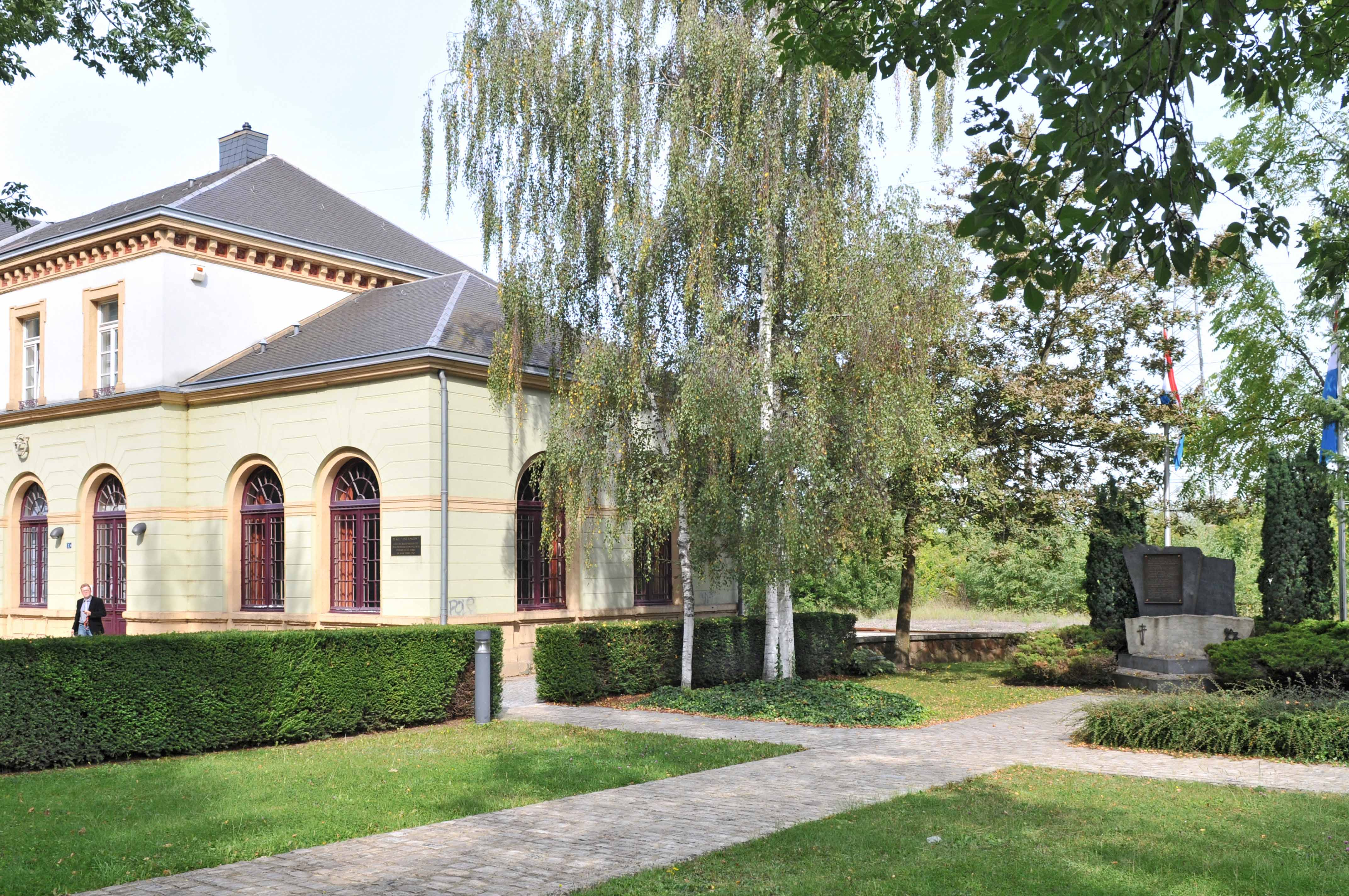 Sujet: Déi fréier Hollerechergare (Deportatiounsmemorial) an d'Deportatiounsmonument Auteur: lb : User: Cayambe Source: Eege Foto Lizenz: Creative Commons